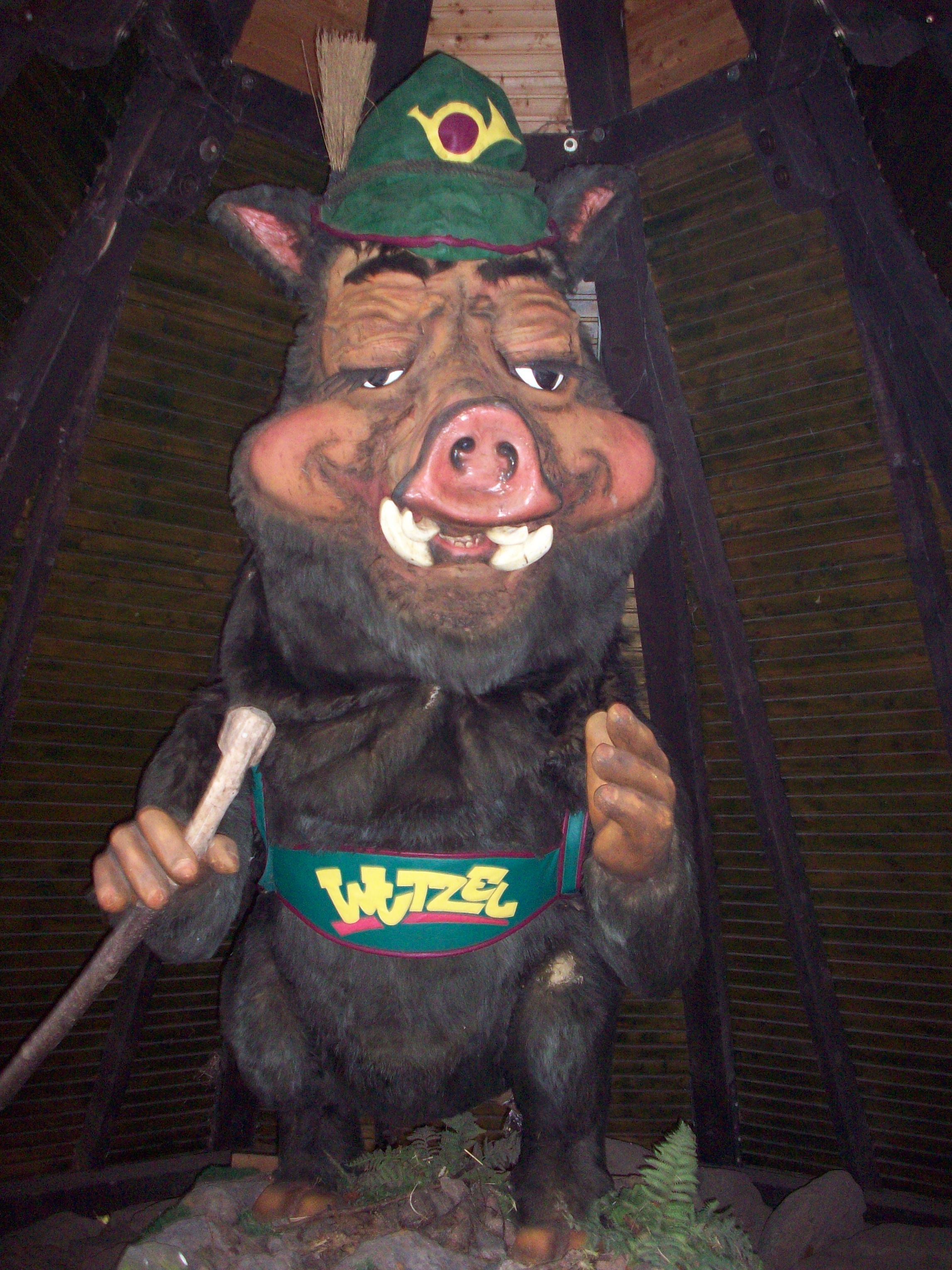 Das Wahrzeichen des Kurpfalz-Parks Wachenheim - Das Wutzel